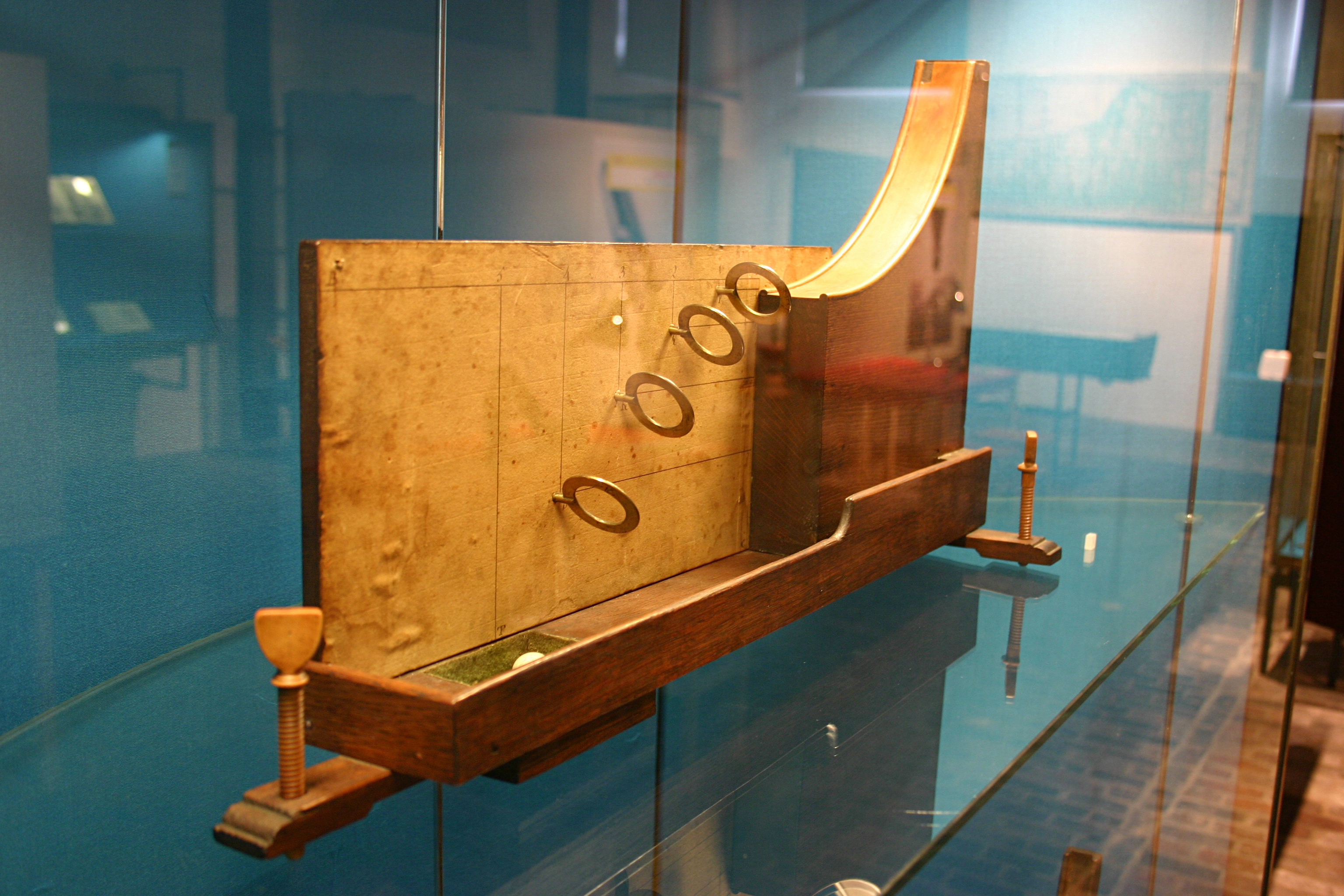 Museum Boerhaave, Leiden - Demonstration device